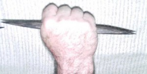 guayka doble